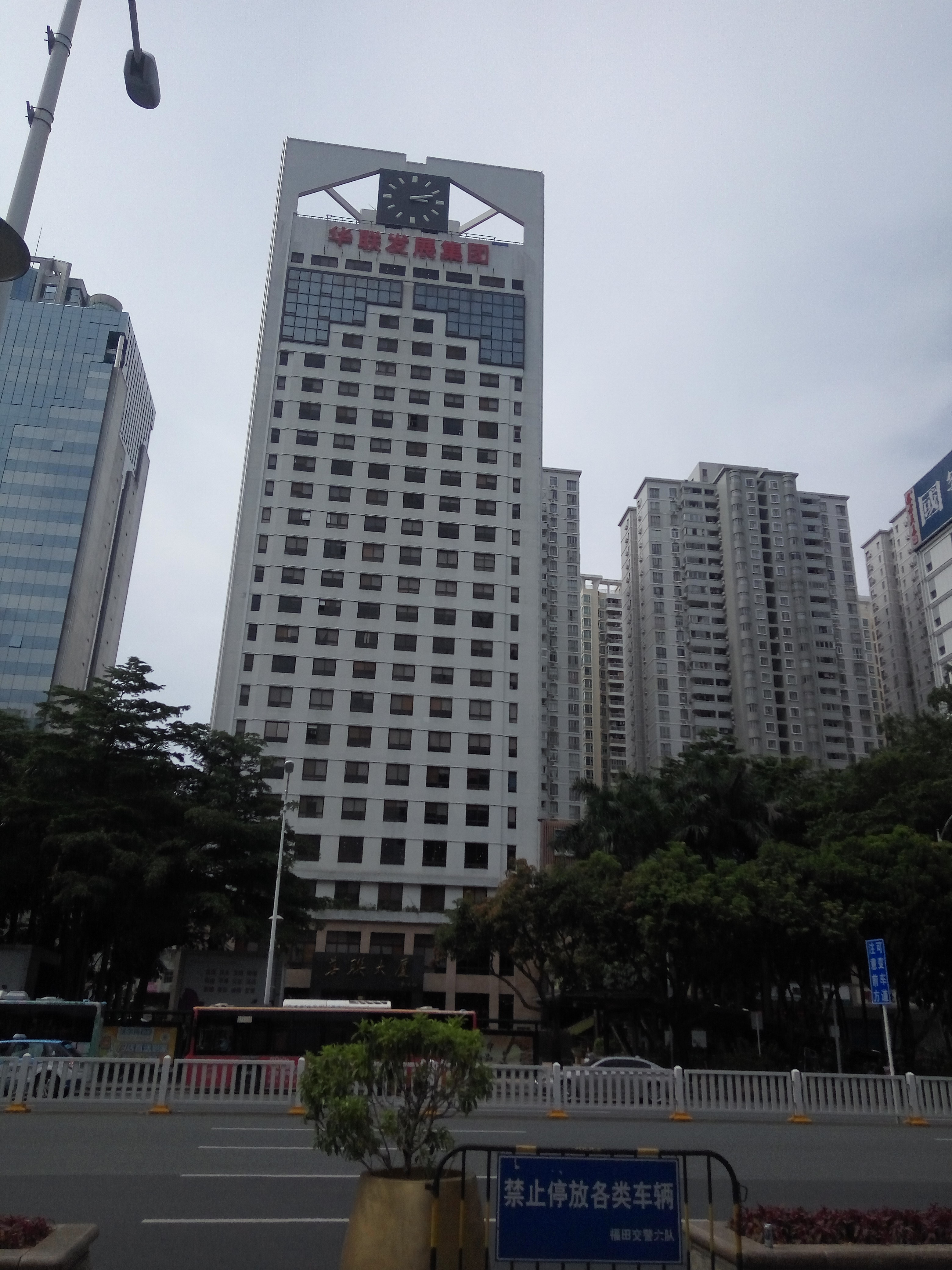 华联大厦，深圳著名钟楼之一